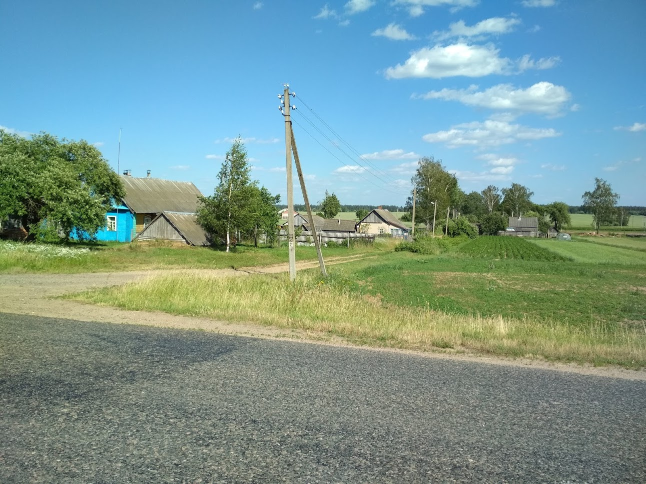 Северный въезд в деревню Толкачи